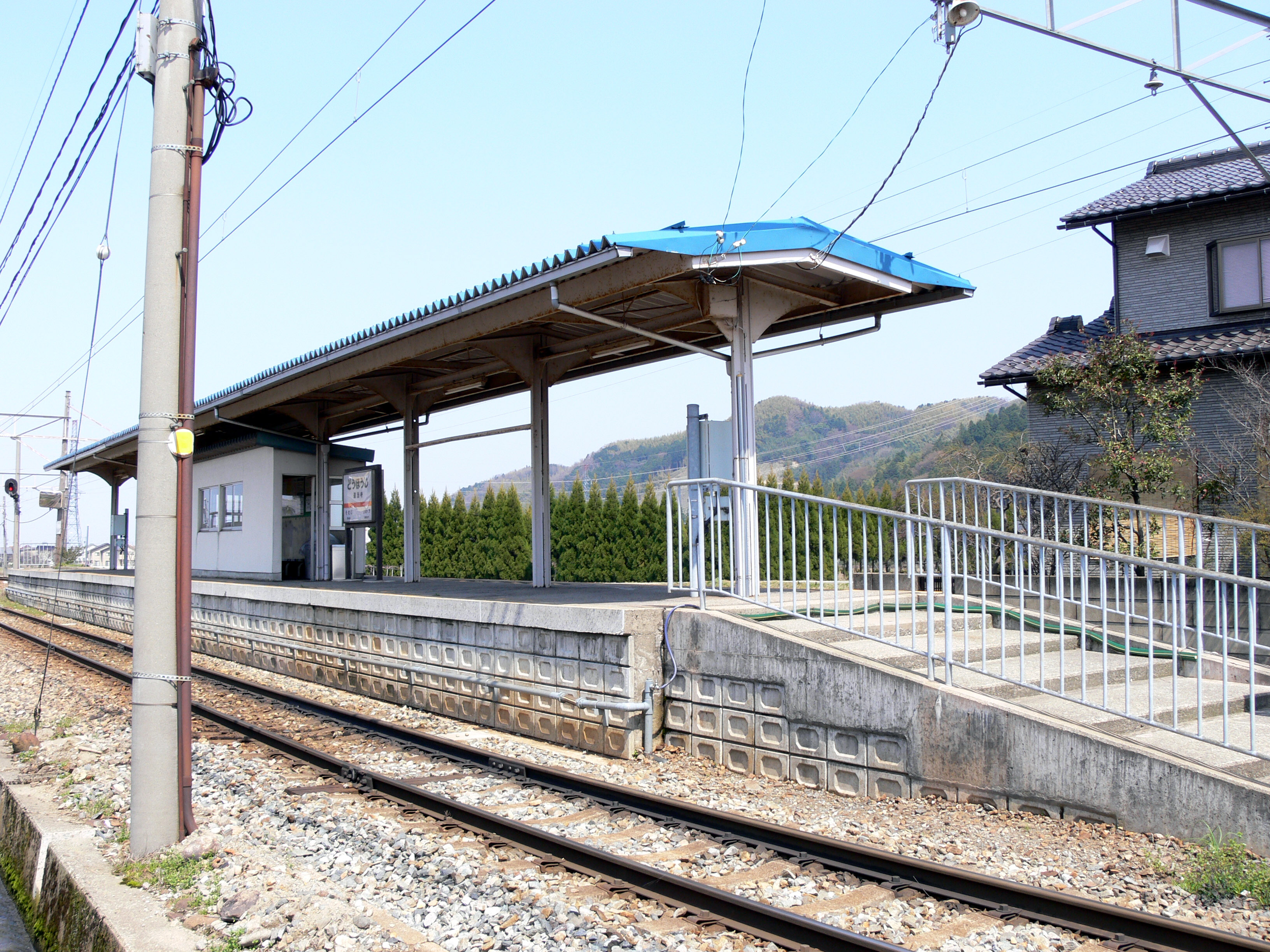 道法寺駅